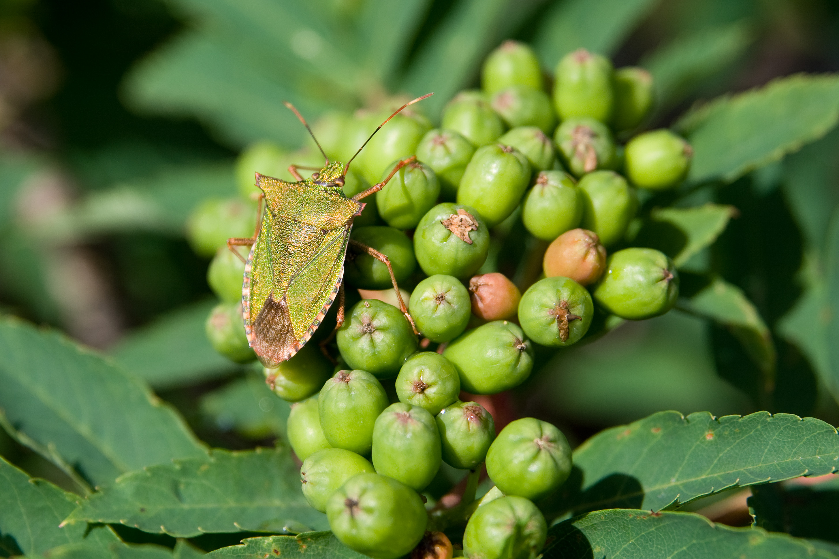 ツノアオカメムシ (学名：Pentatoma japonica)